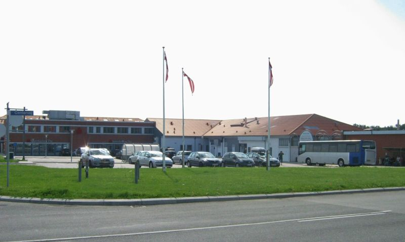 Einkaufszentrum in Hanstholm, Centervej